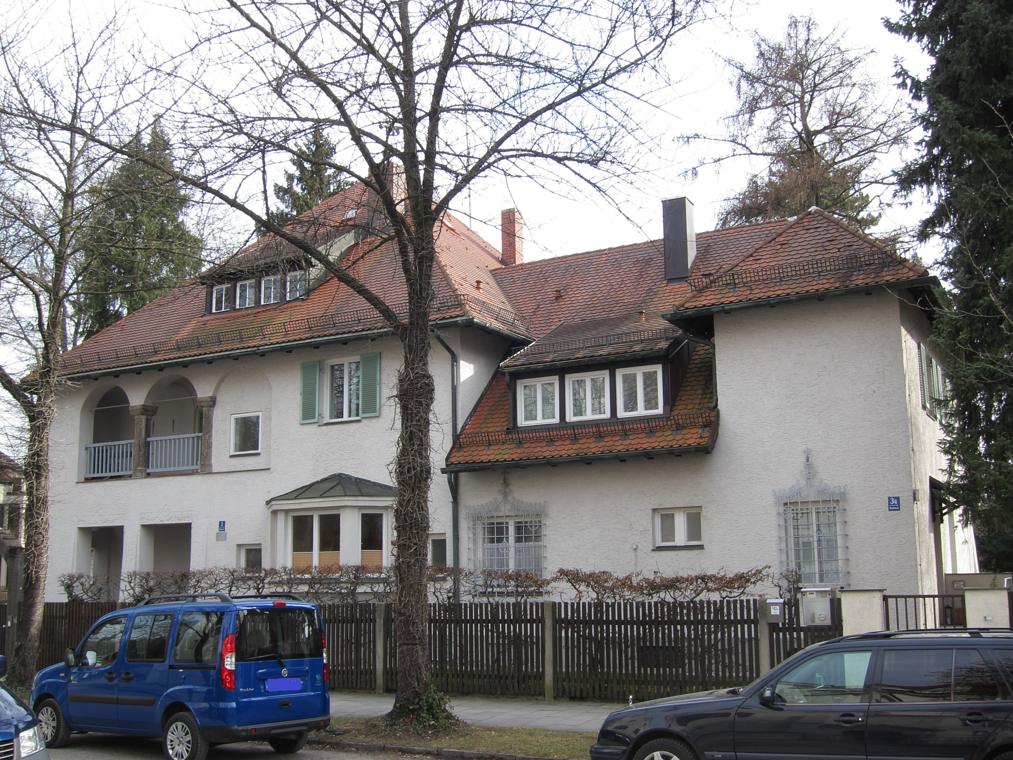 Marschnerstraße 3,3a; Ehem. Wohnhaus Arthur Riemerschmid, jetzt evang.-luth. Pfarramt, asymmetrisches Doppelhaus, bez. 1900, von Theodor Fischer.